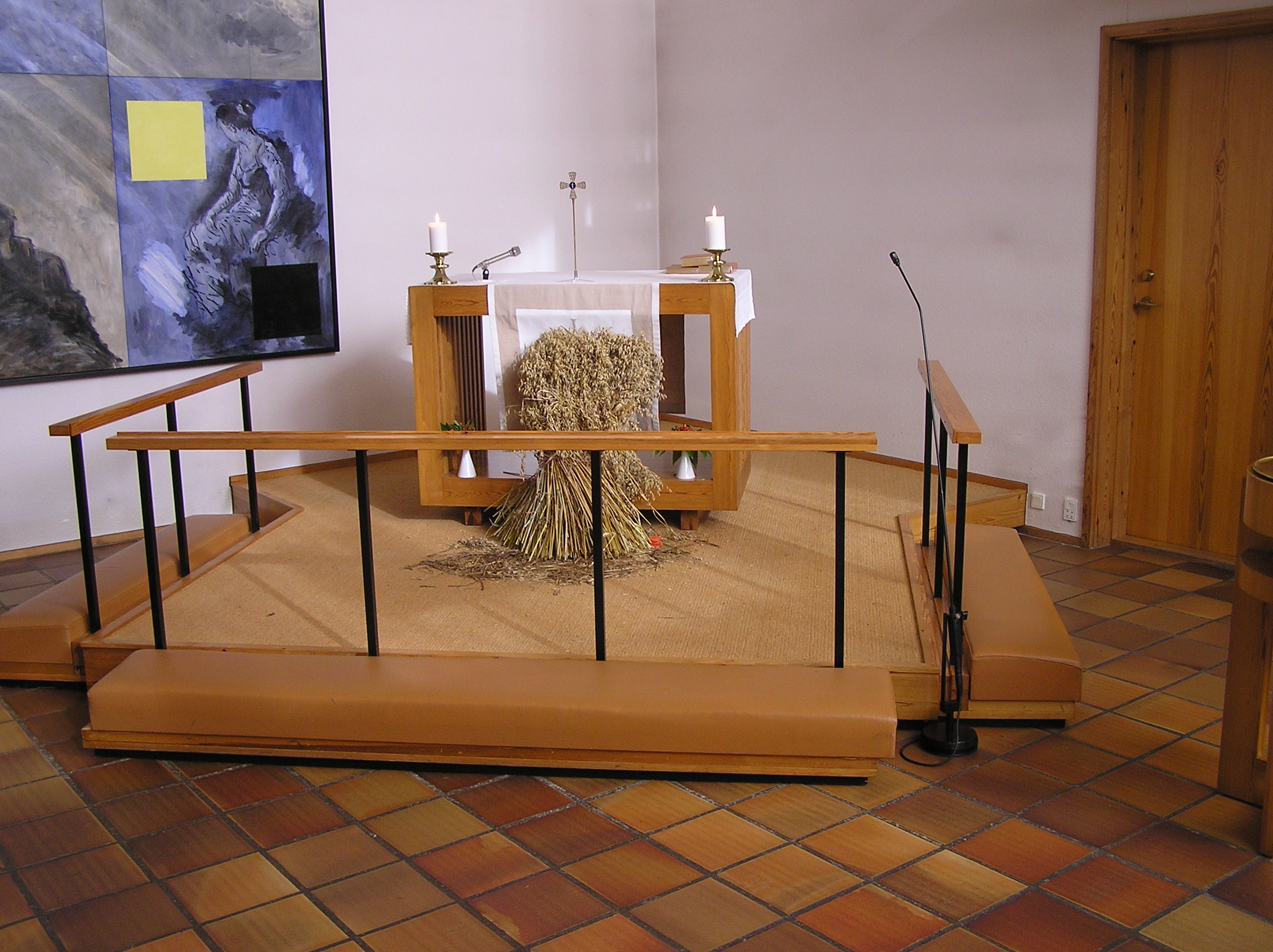 Bavnehøj Kirke, alter